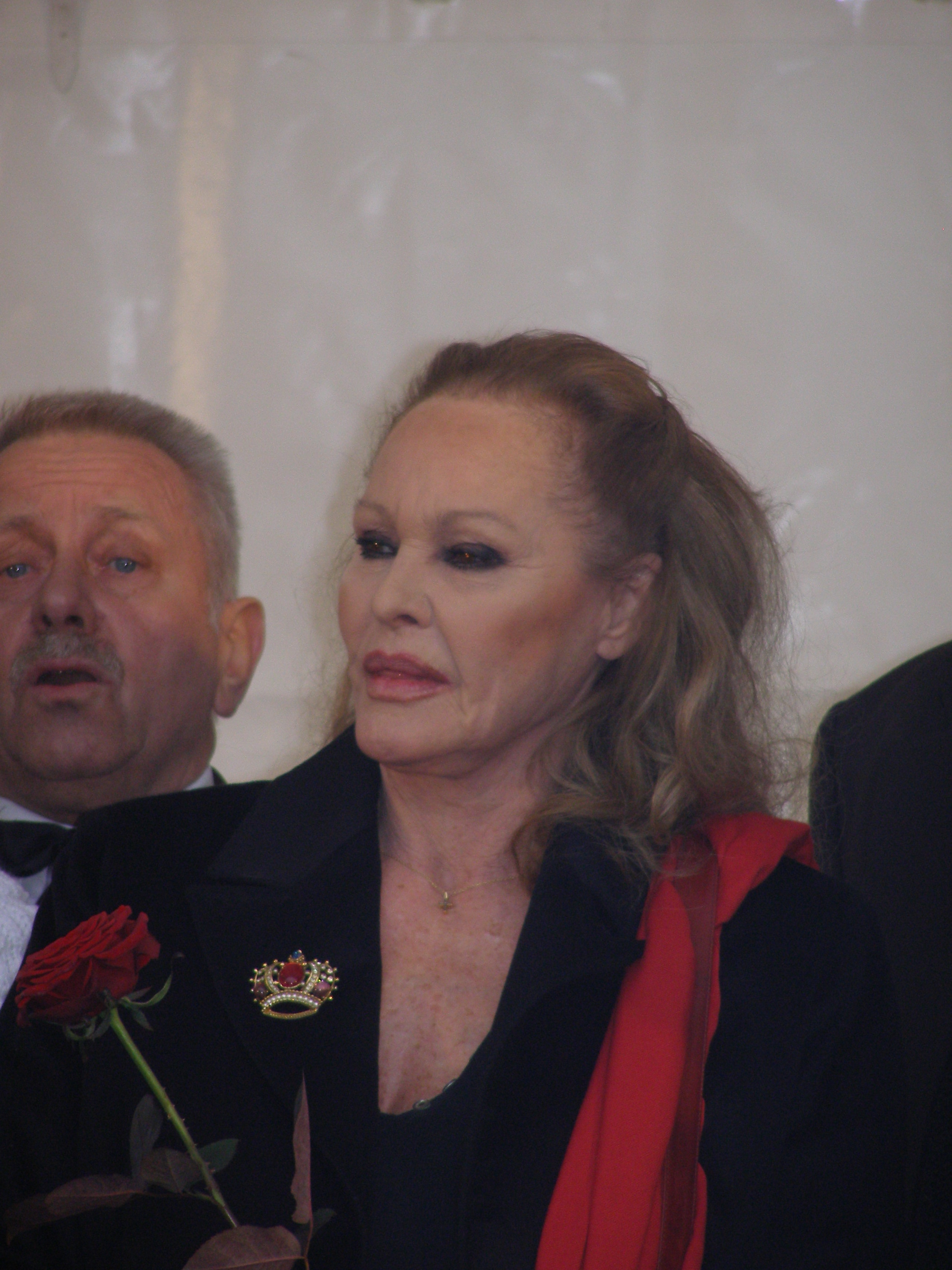 Ursula Andress in her Hometown in Ostermundigen, Switzerland